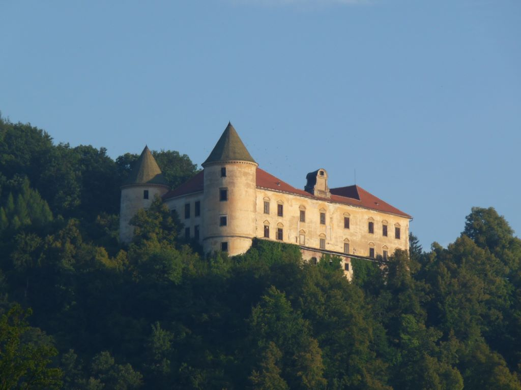 Grad Podčetrtek